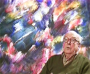 Portrait de Jean Le Moal